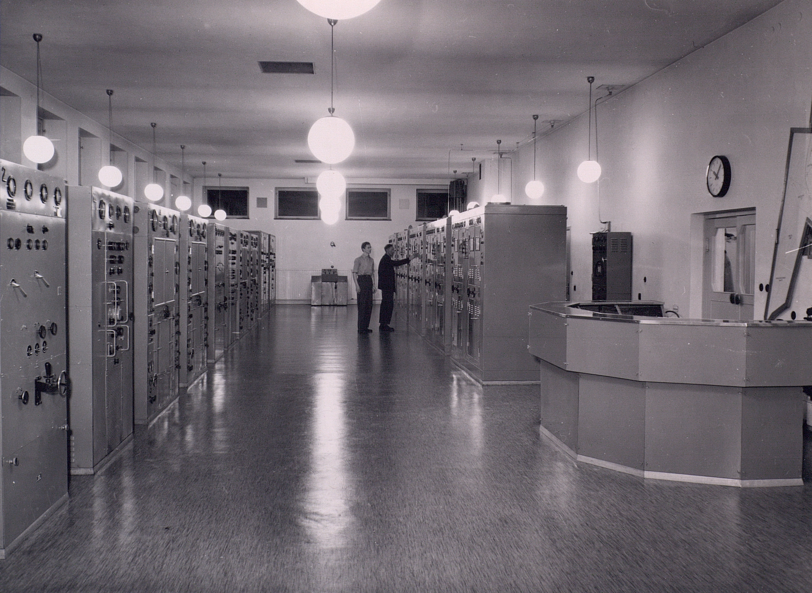 Kustradiostationen Göteborg Radio, sändarstation i Vallda.